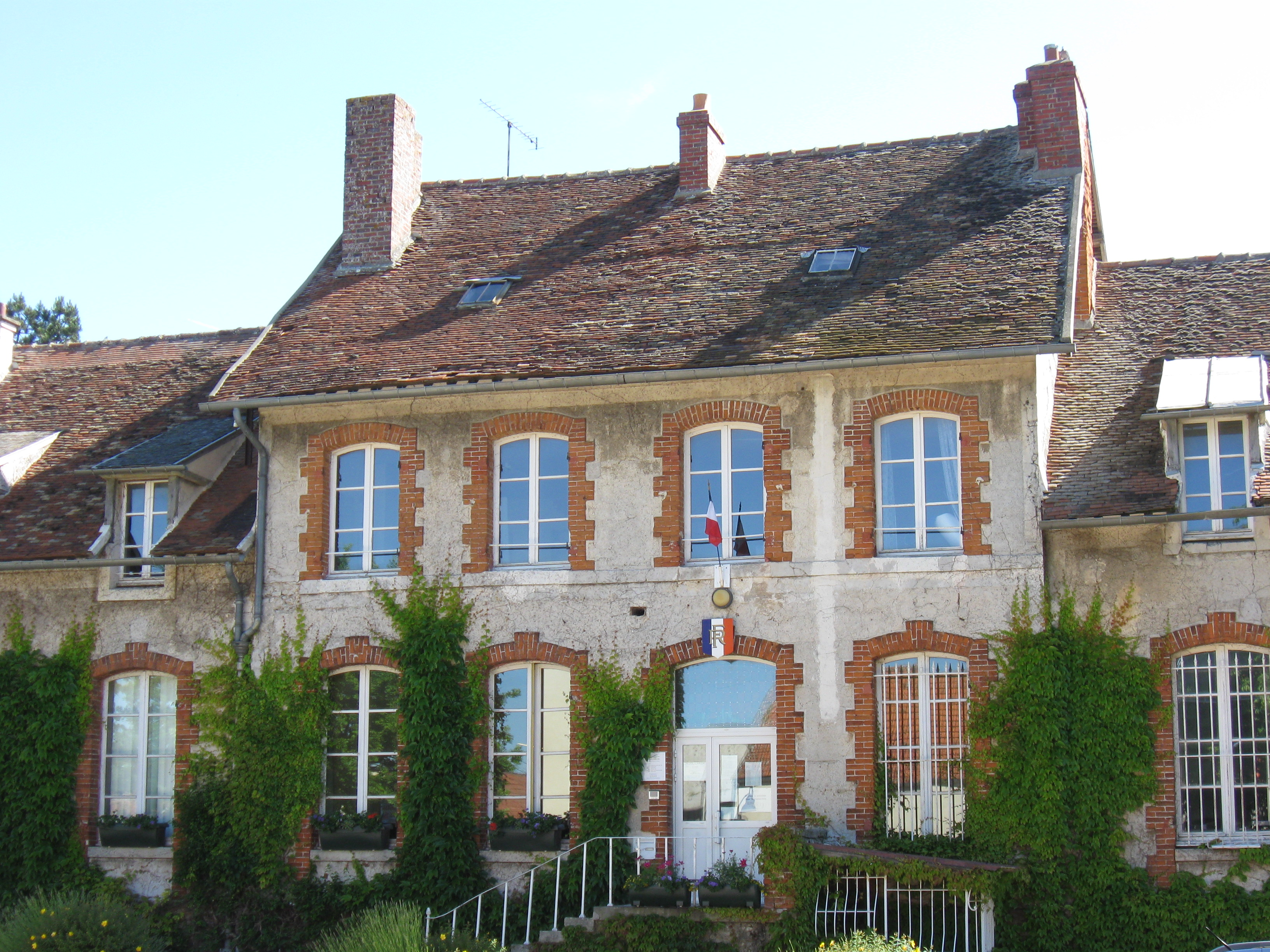 Mairie de Chauconin-Neufmontiers (Seine-et-Marne, région Île-de-France).